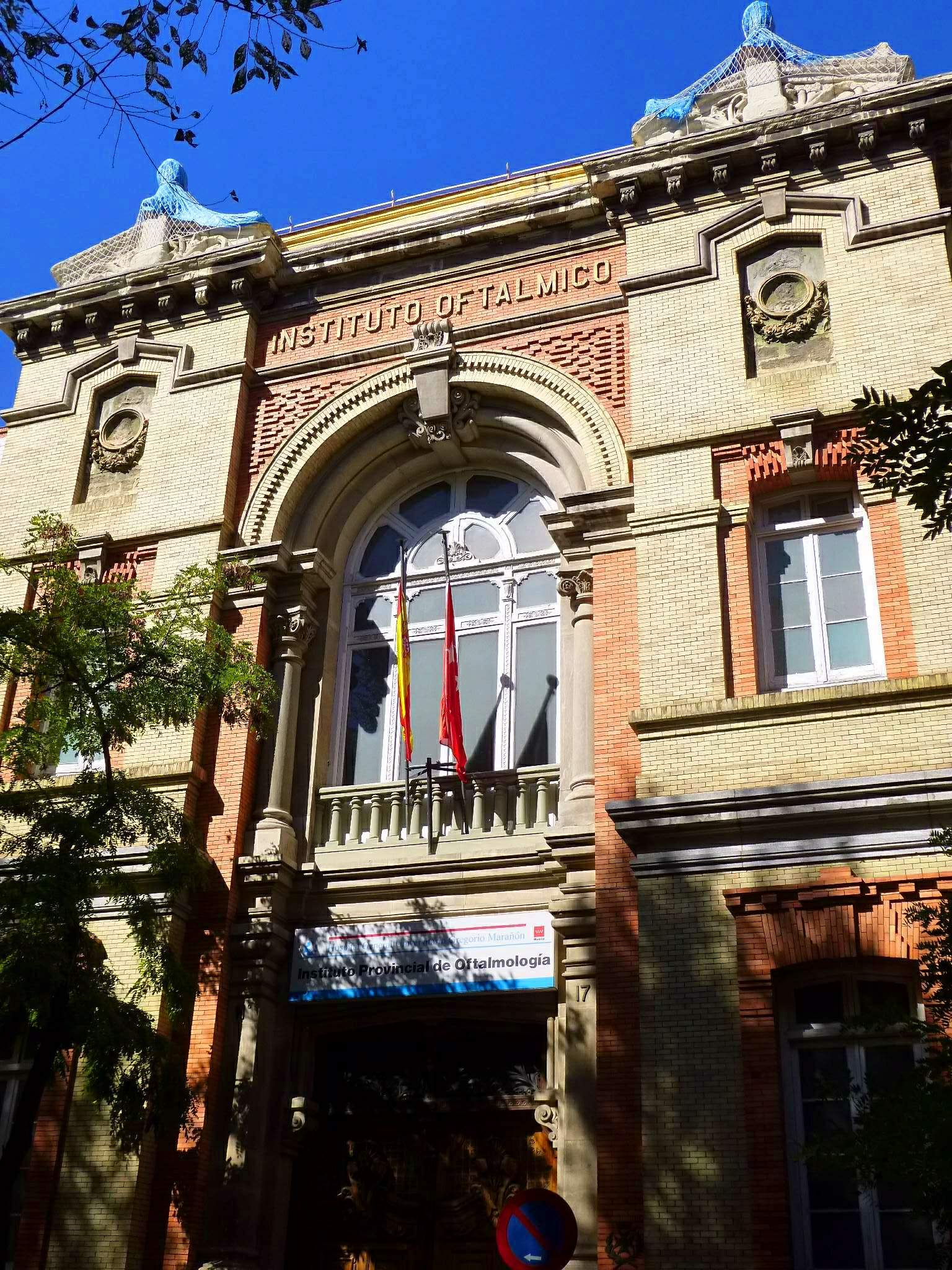 Edificio del Instituto Oftálmico, en la calle Arrando del barrio de Chamberí, en Madrid